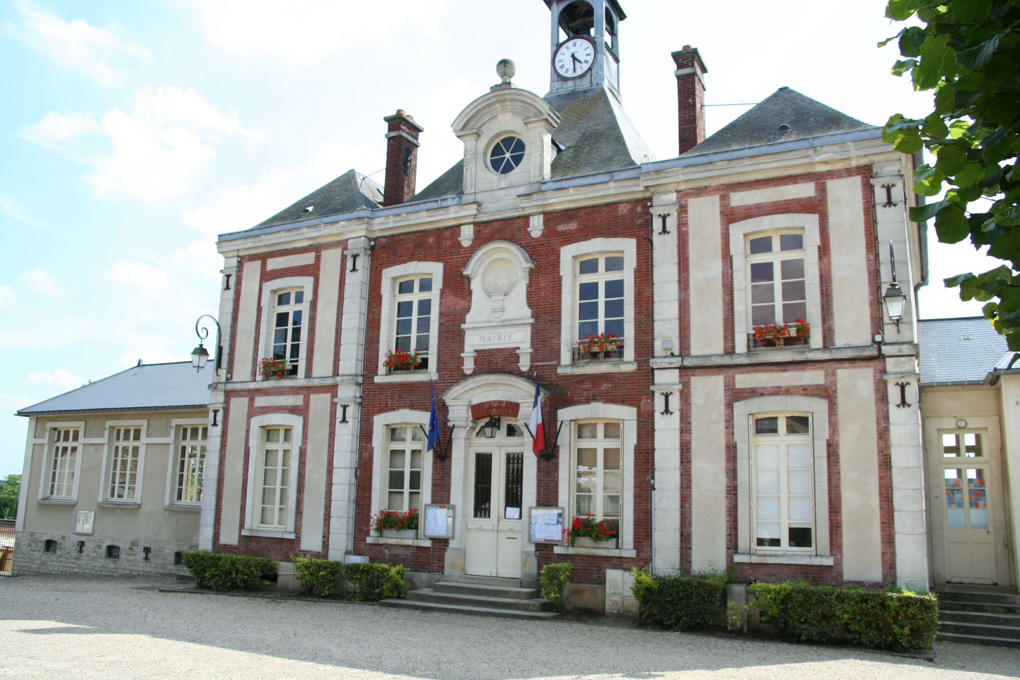 Mairie de Fontenay-Saint-Père, Yvelines (France)